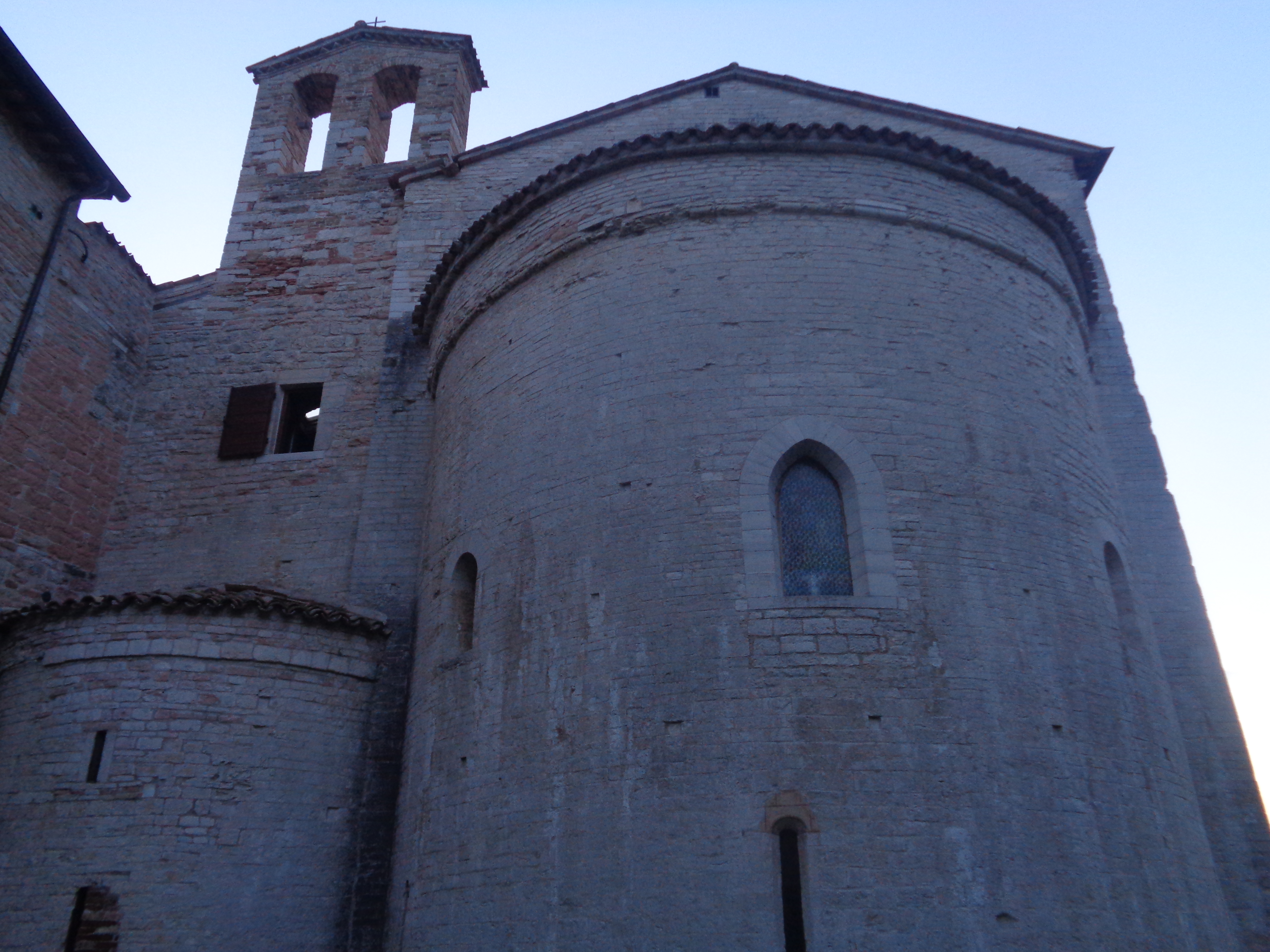 Abbazia di San Vincenzo - abside This is a photo of a monument which is part of cultural heritage of Italy.